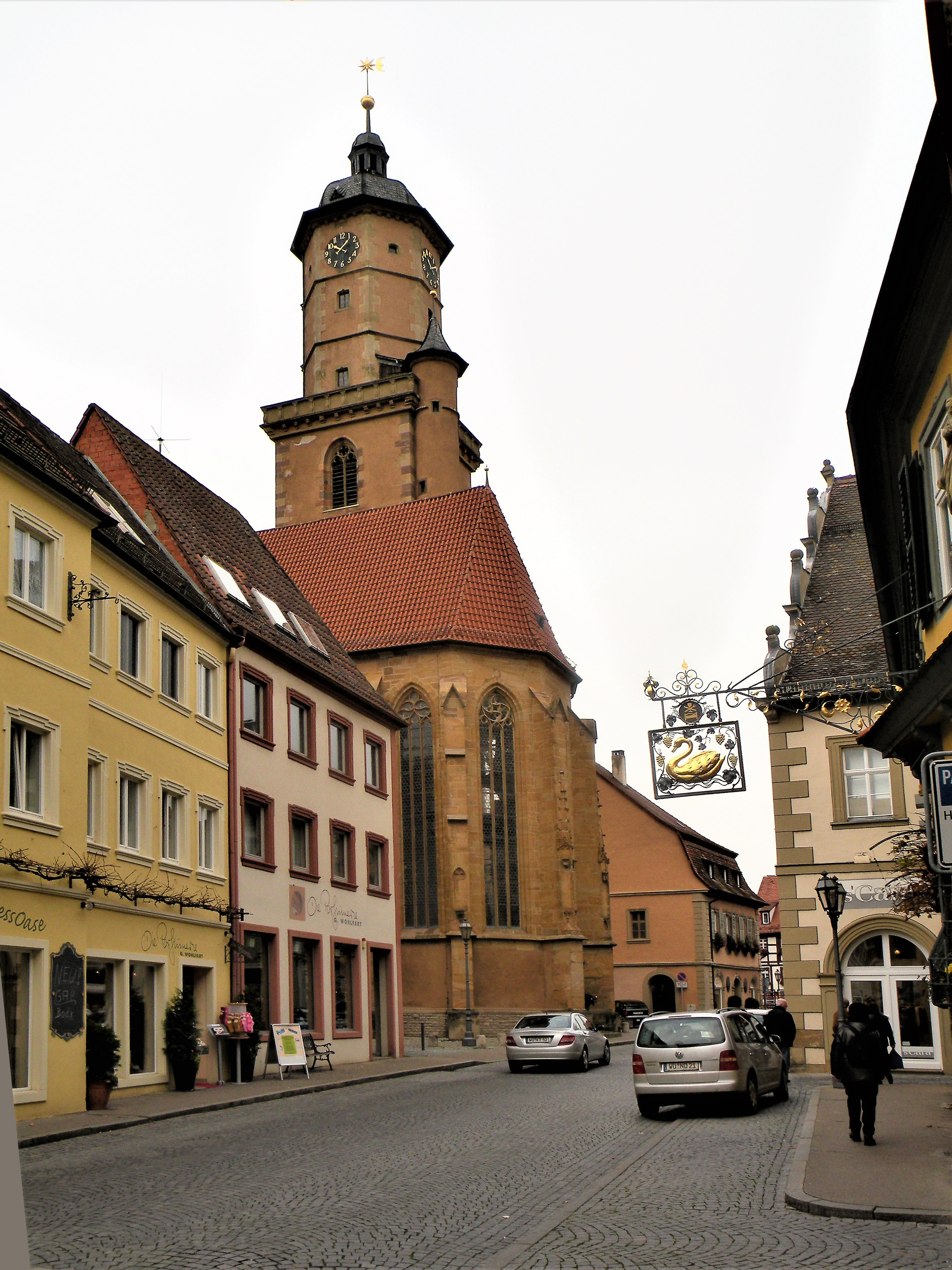 Церковь св. Варфоломея. Вид от алтарной части.